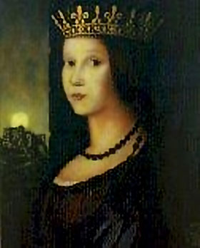 Bild der (vor)-letzten Königin des mittelalterlichen Bosniens. Ist gemeinfrei.